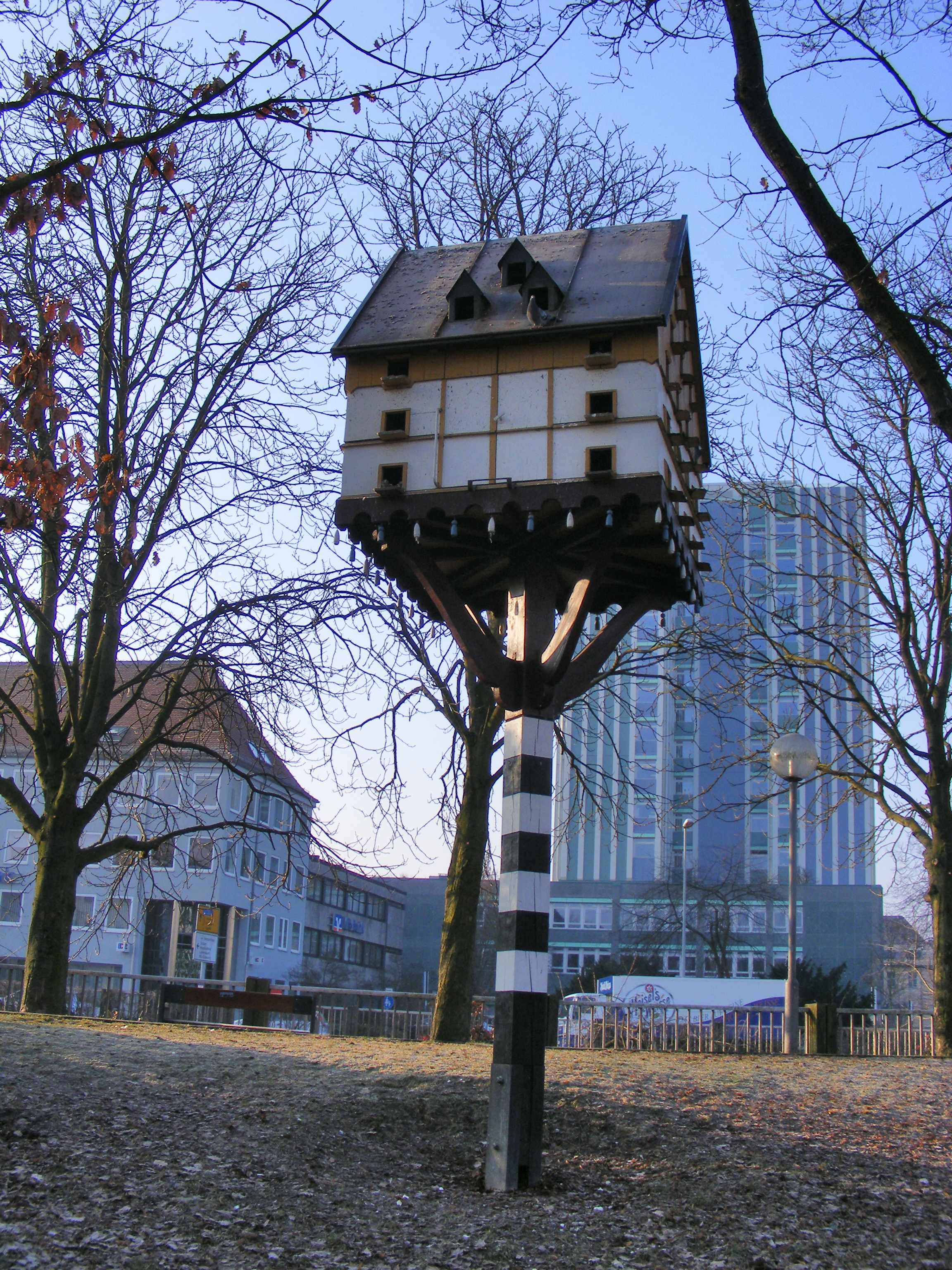 Bayreuth, Taubenschlag (ggü. Neuem Rathaus)